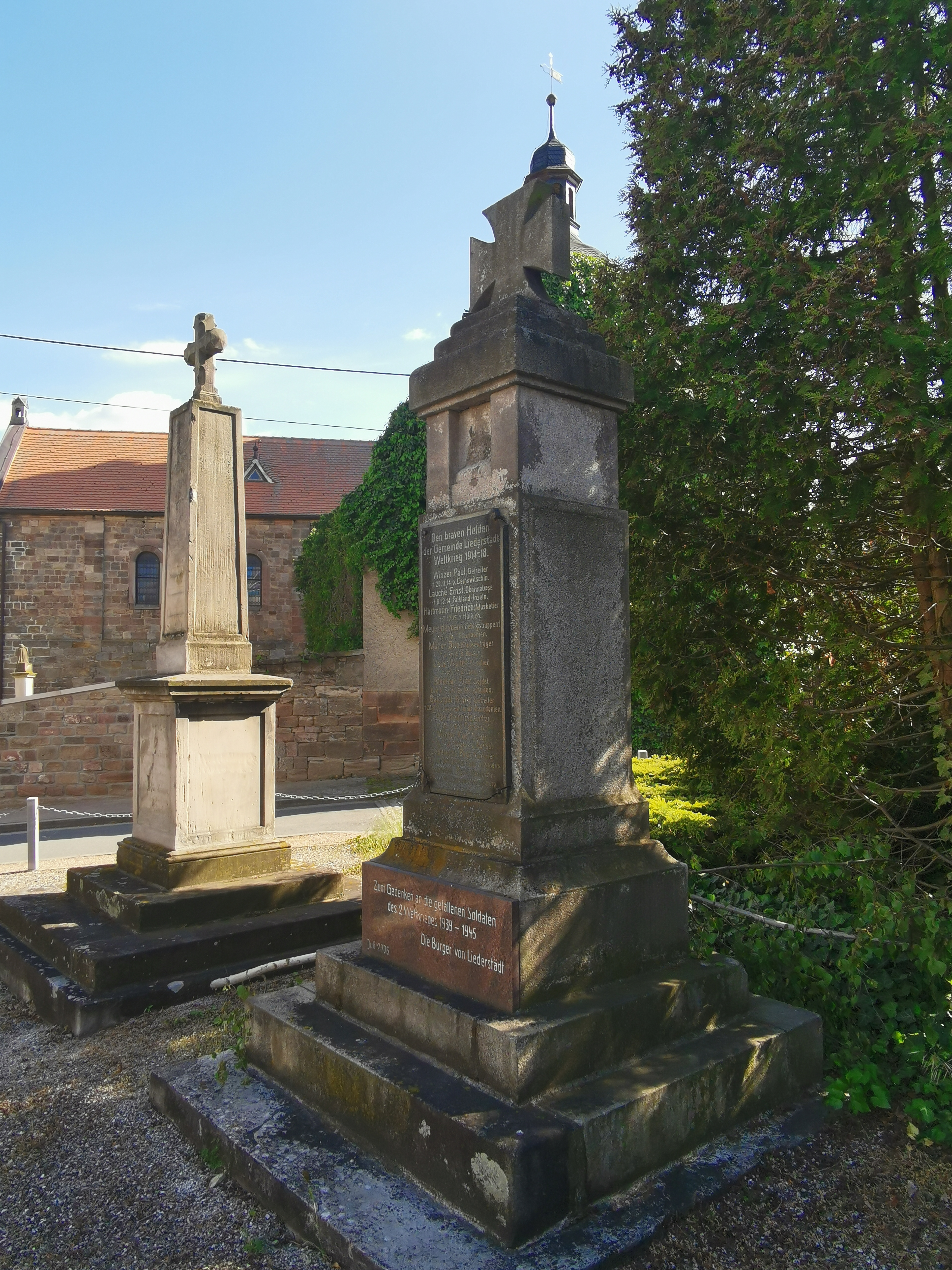 Kriegerdenkmal in Liederstädt